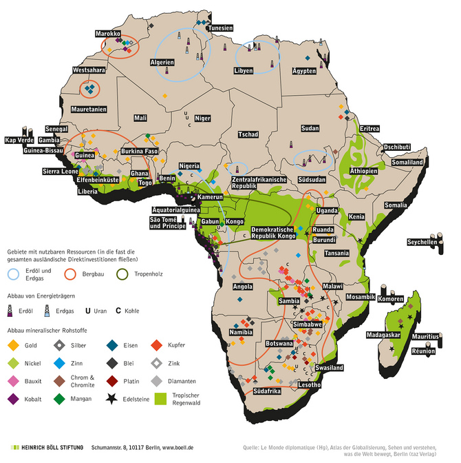 "Rohstoffvorkommen auf dem afrikanischen Kontinent (Darstellung von 2009)" Neu arrangierte Grafik aus der Serie: Infografiken der Heinrich Böll Stiftung zu Afrikas Wirtschaften vom 25. Feb. 2014